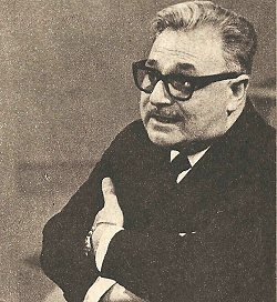 Es una foto del economista, política, intelectual y periodista Rogelio Frigerio.